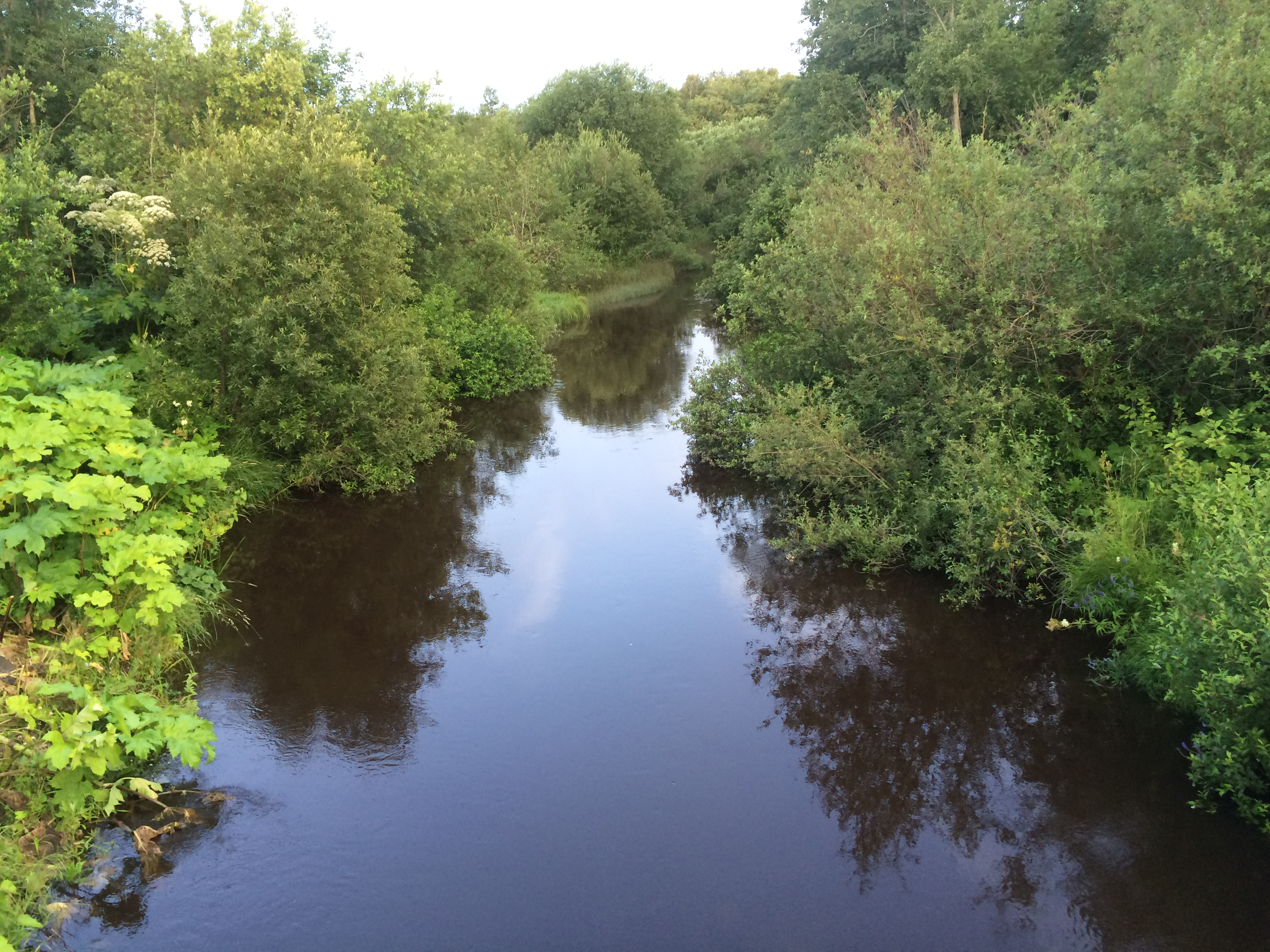 Савайнйоки